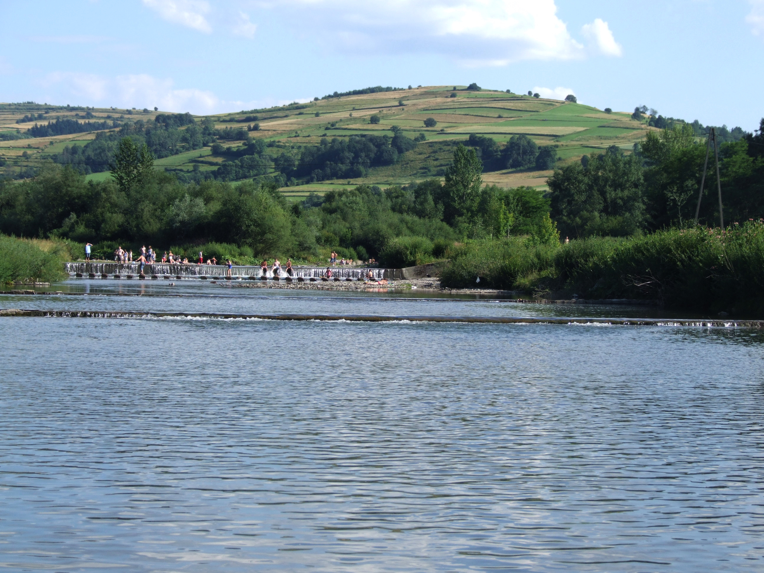 Mszanka w Mszanie Dolnej. U góry wzgórze Kocia Górka